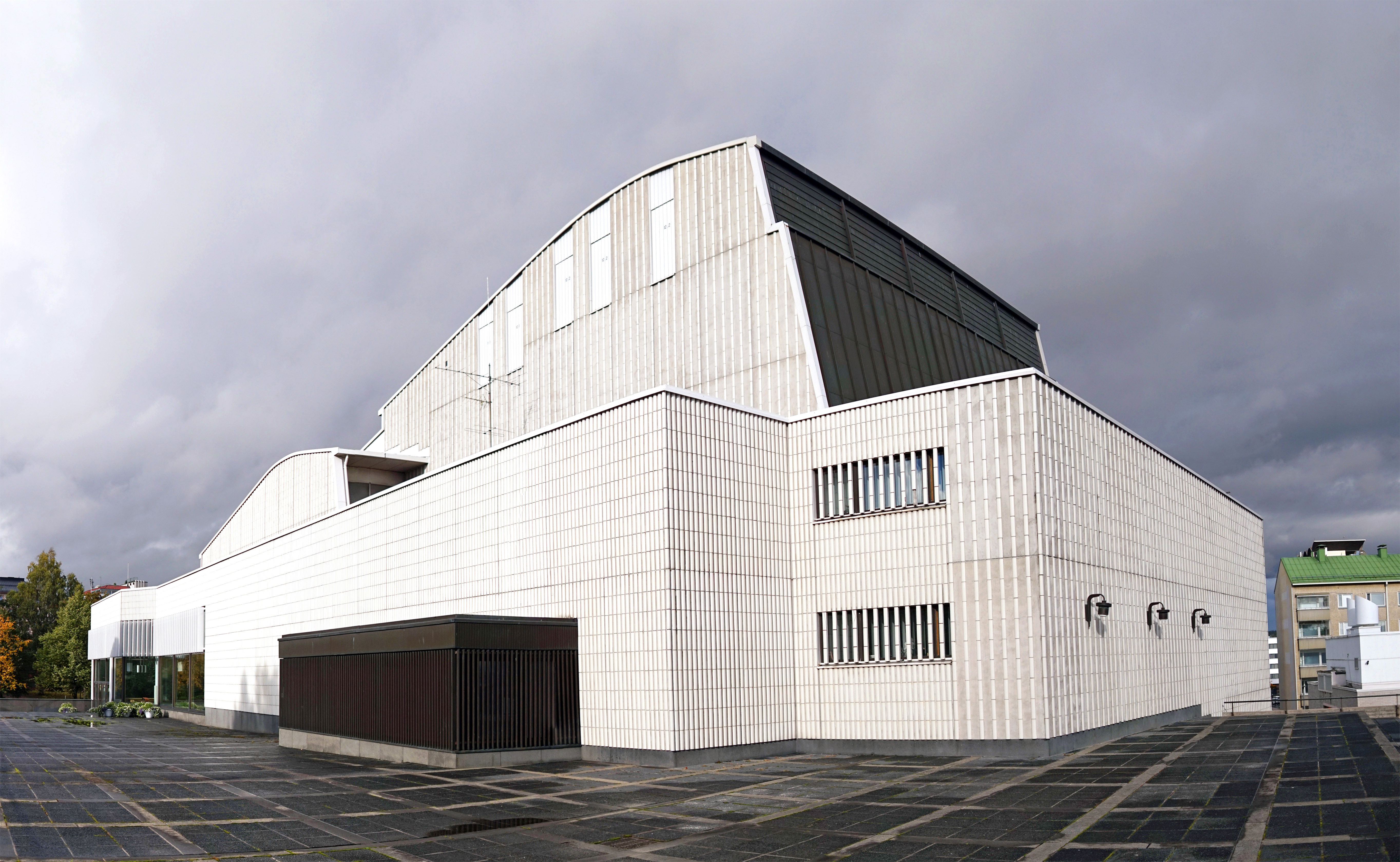 Jyväskylän kaupunginteatteri